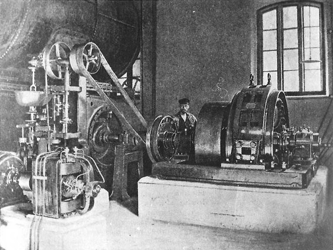 Uddby kvarn och kraftstation gamla generator